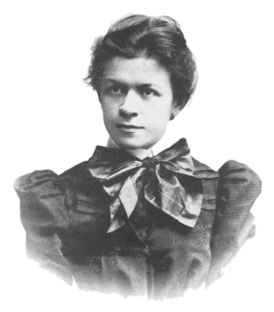 Mileva Maric, Albert Einstein's wife